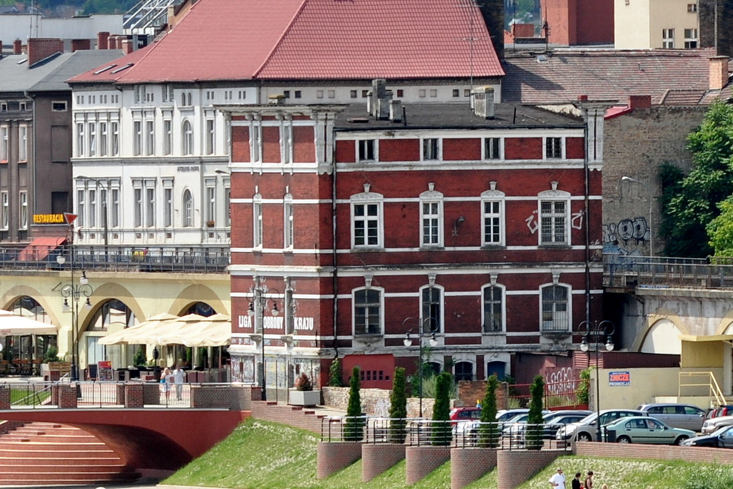 Gorzów Wielkopolski, ul.Nadbrzeżna 1. Willa Herzoga z 1900 r. - widok z przeciwległego brzegu Warty (zabytek nr L-37 z 11.12.2000)